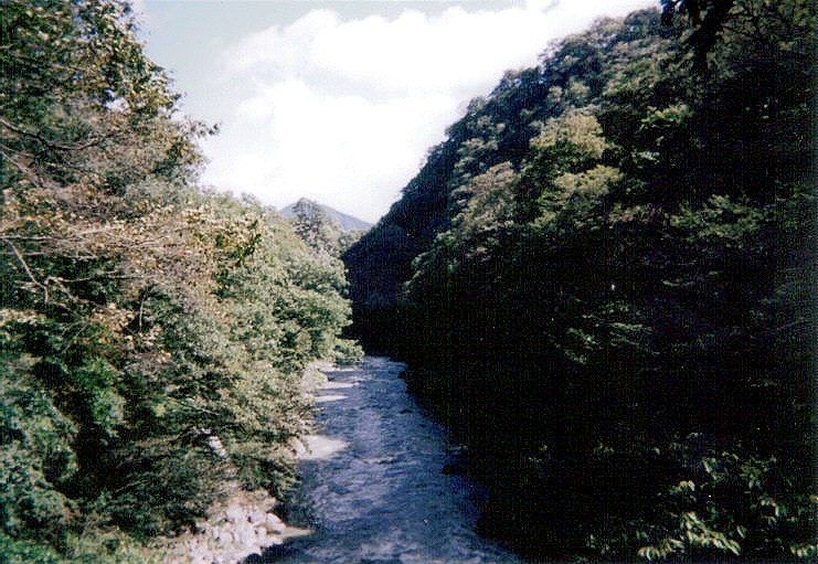 Dam